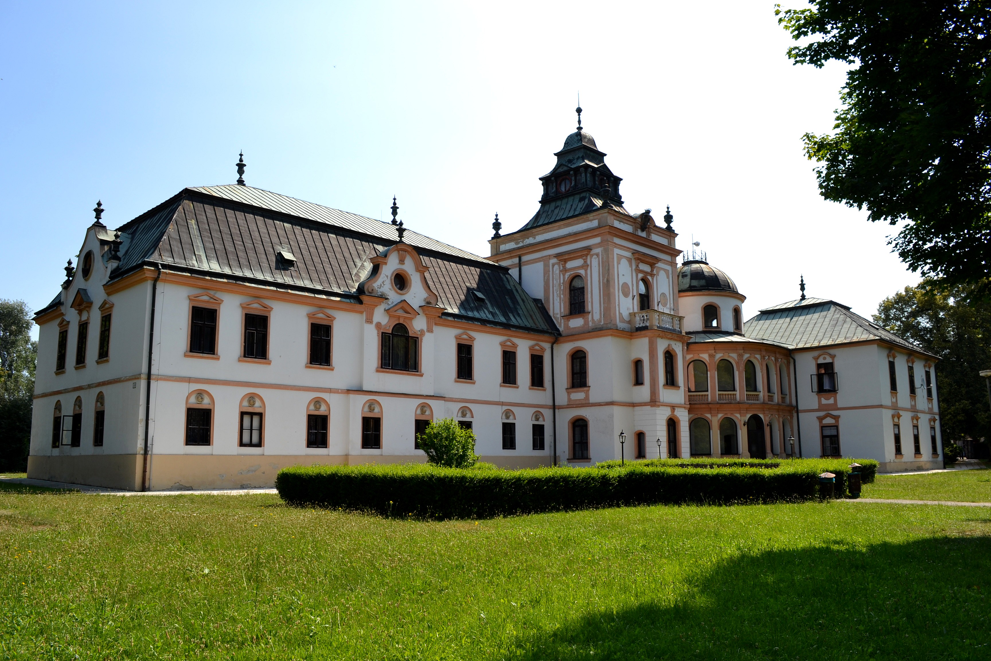 Klátova Nová Ves (okr. Partizánske), neobarokový kaštieľ v obci; pohľad od juhozápadu zo zámockého parku